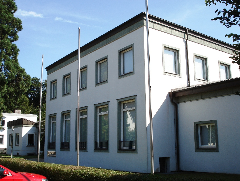 Gebäude des Museums der Stadt Bad Schwartau